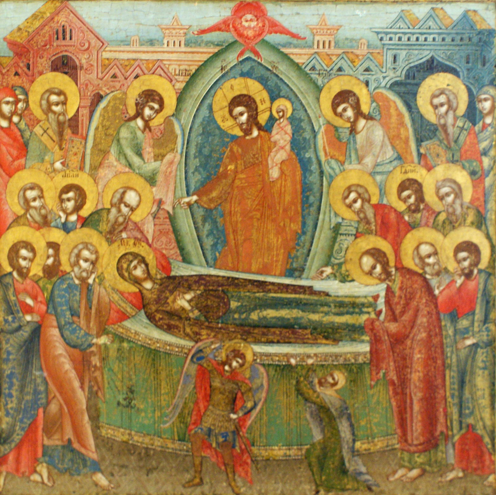 Абраз "Прачыстая" XIX ст. (па іканаграфіі XVII ст.), Расія, дрэва, ляўкас, тэмпера